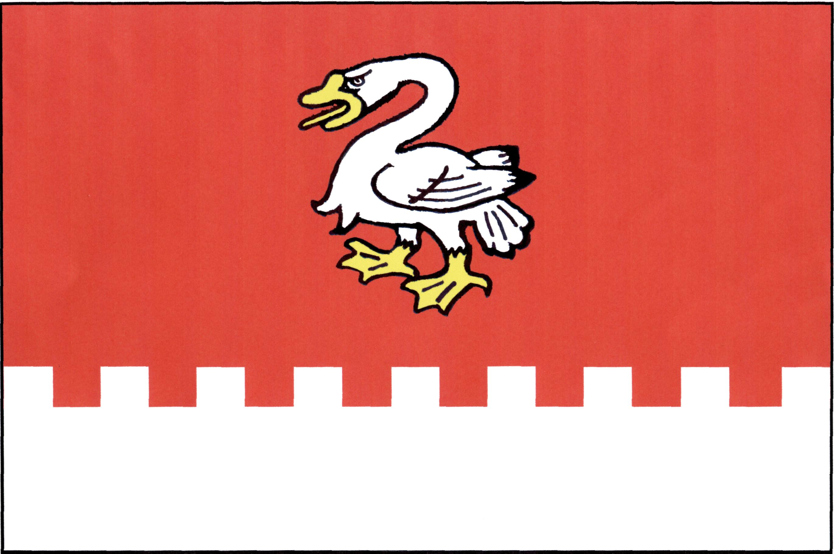 Vlajka obce Bor (okres Tachov)